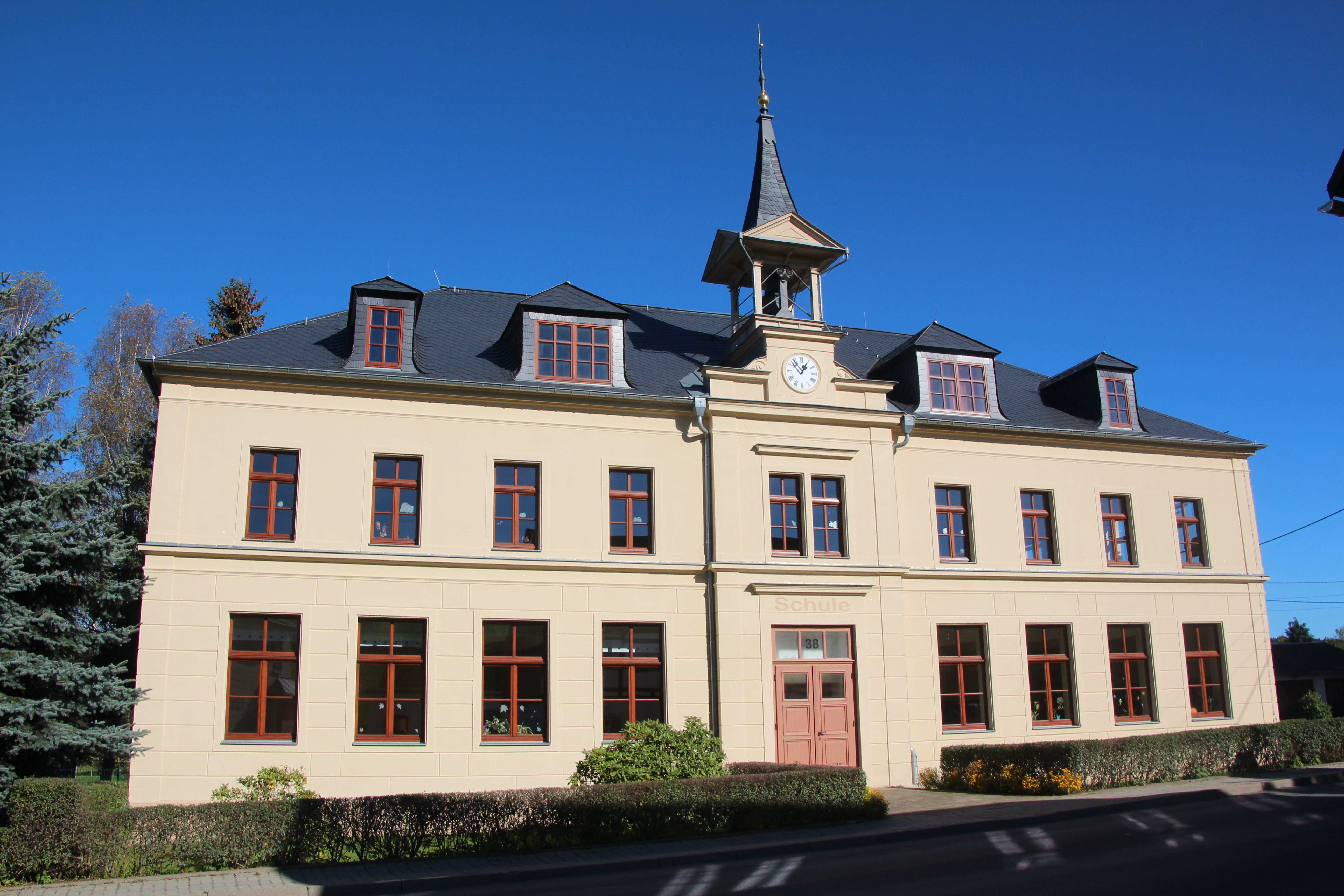 Schule Blumenau in Blumenau, einem Ortsteil der sächsischen Stadt Olbernhau im Erzgebirgskreis, im Oktober 2014.